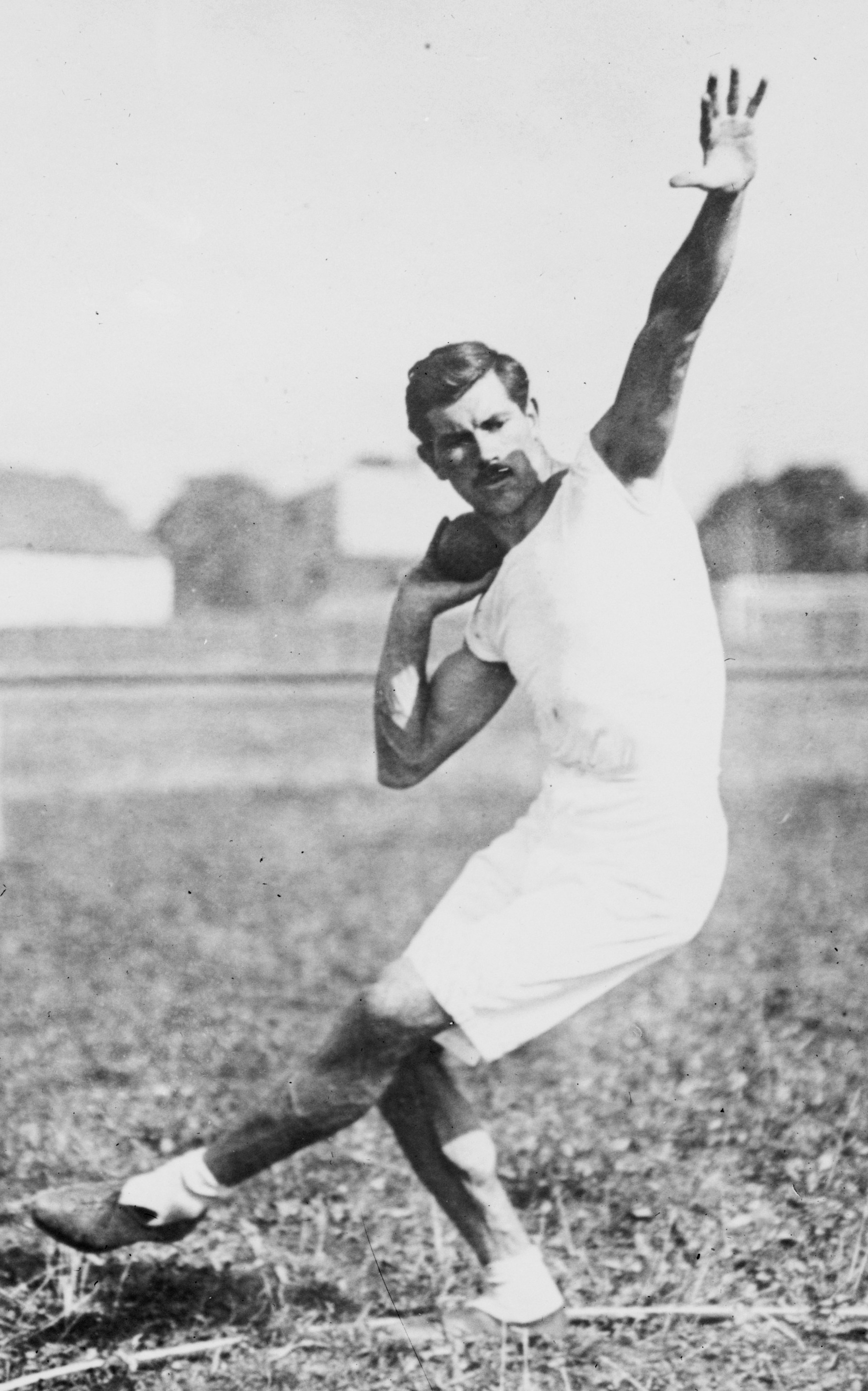 Josef Waitzer in Stockholm Olympics, 1912